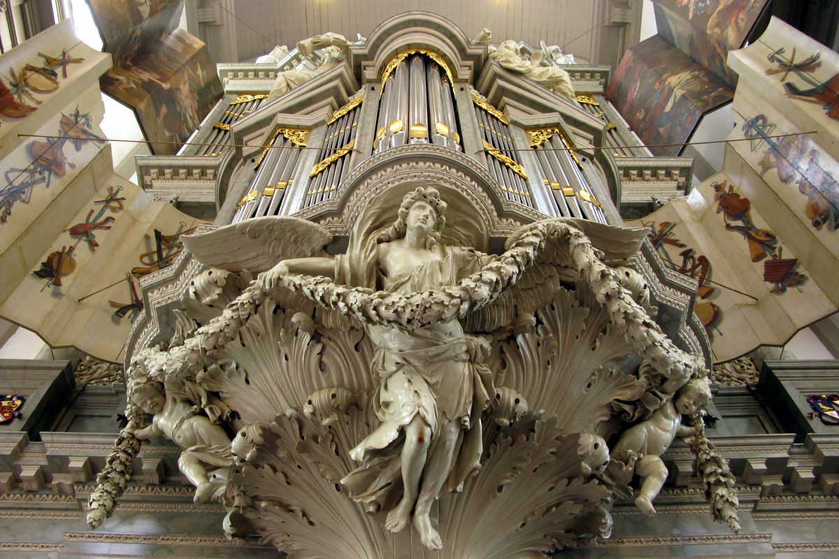 amsterdam, westerkerk